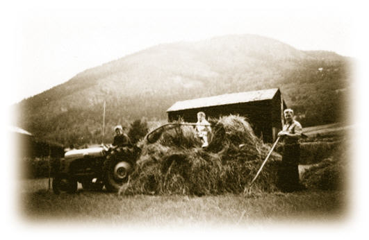 Høykjøring på Sygard Grytting